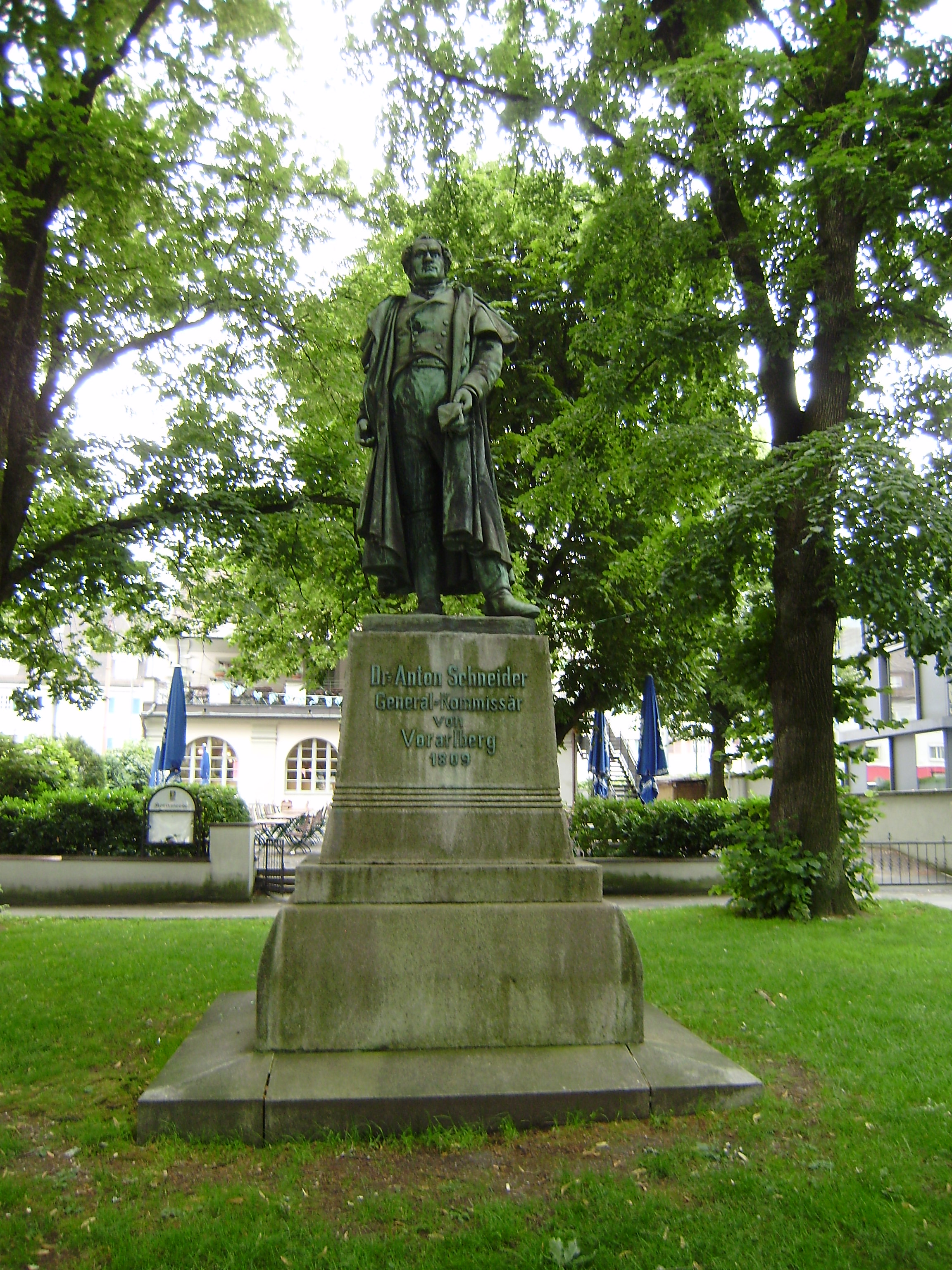 Anton-Schneider-Denkmal, Bregenz (Vorarlberg, Austria)